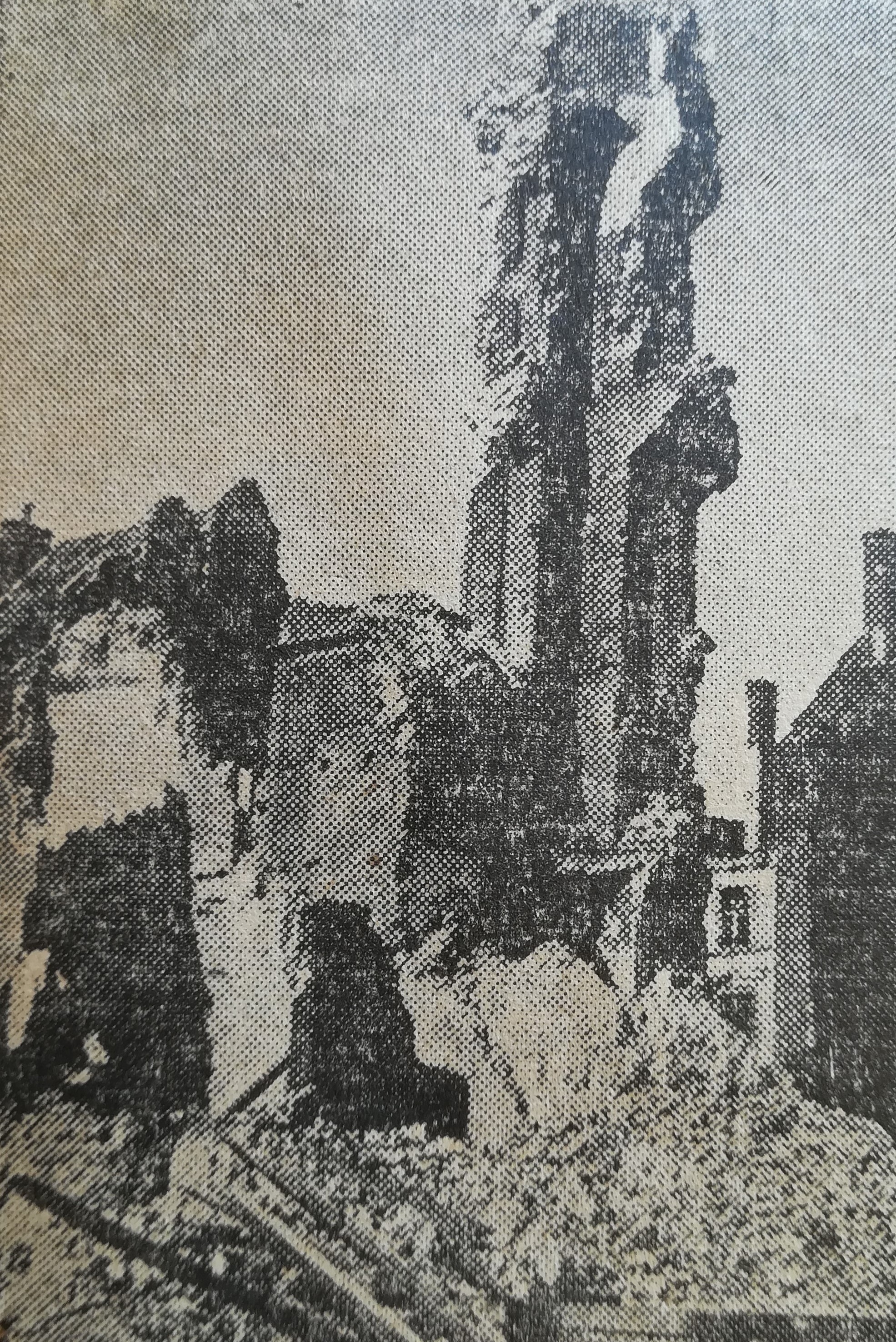 Szczątki wieży ratuszowej w Nysie po zniszczeniach II wojny św.